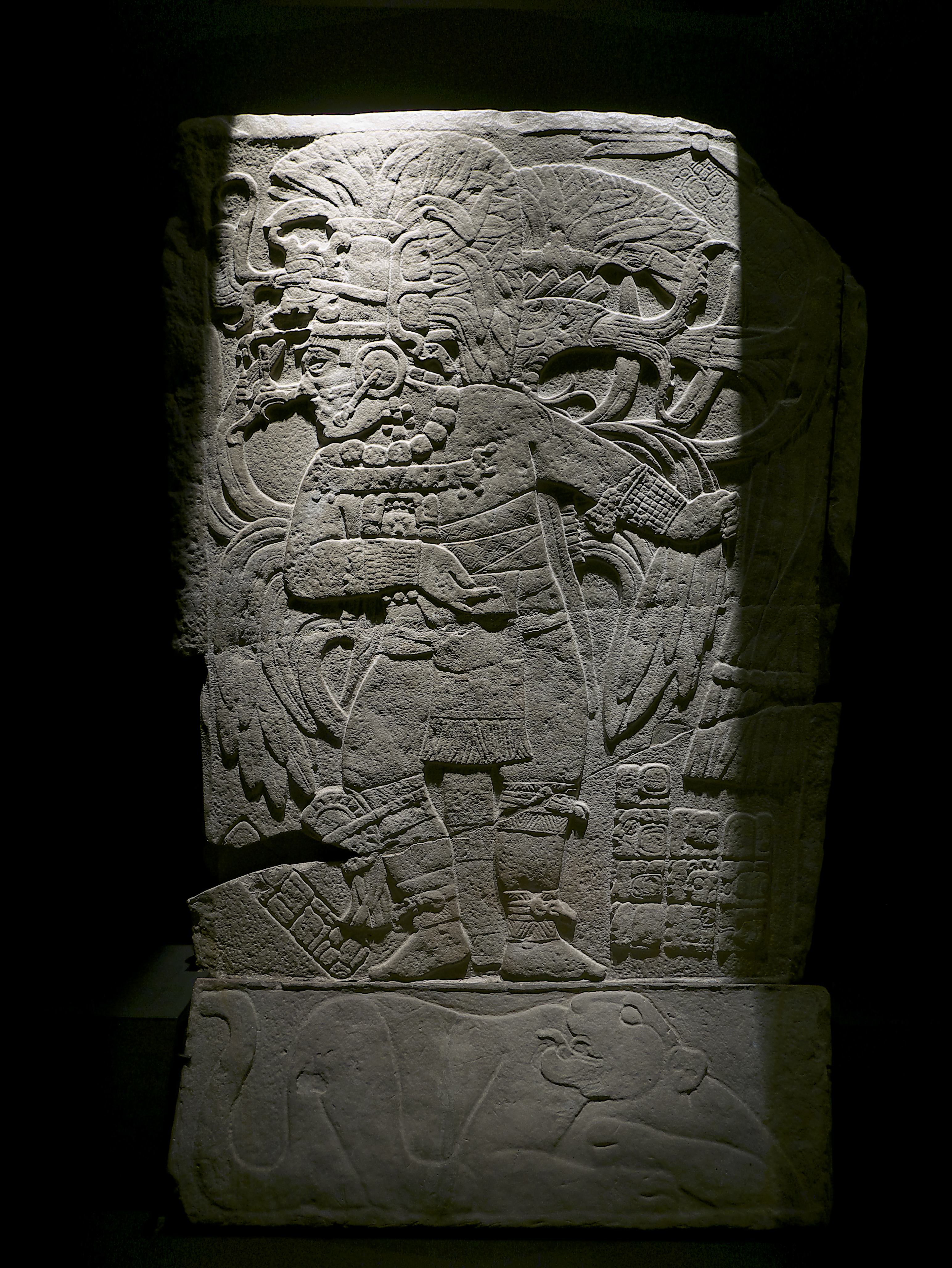 Mayas. El enigma de las ciudades perdidas (Museo Arqueológico de Alicante). La Amelia, estela o panel de la acrópolis, perteneciente al periodo clásico tardío (807), piedra caliza. El rey Lachan K'awiil Ajaw Boot baila sobre un jaguar.